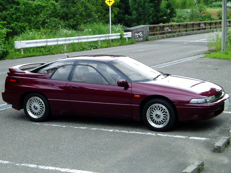 Subaru SVX